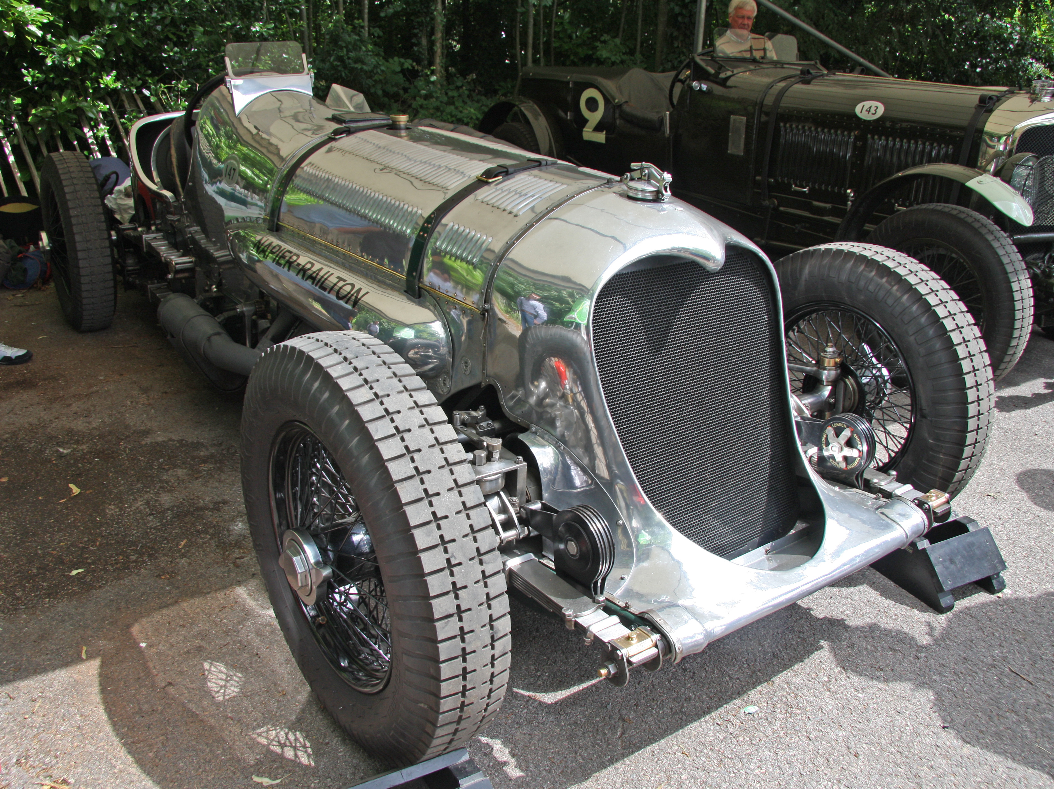 Built 1933. 24 litre W12